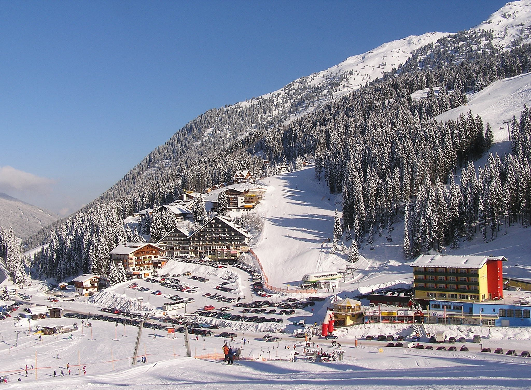 Das Hoteldorf Hochfügen